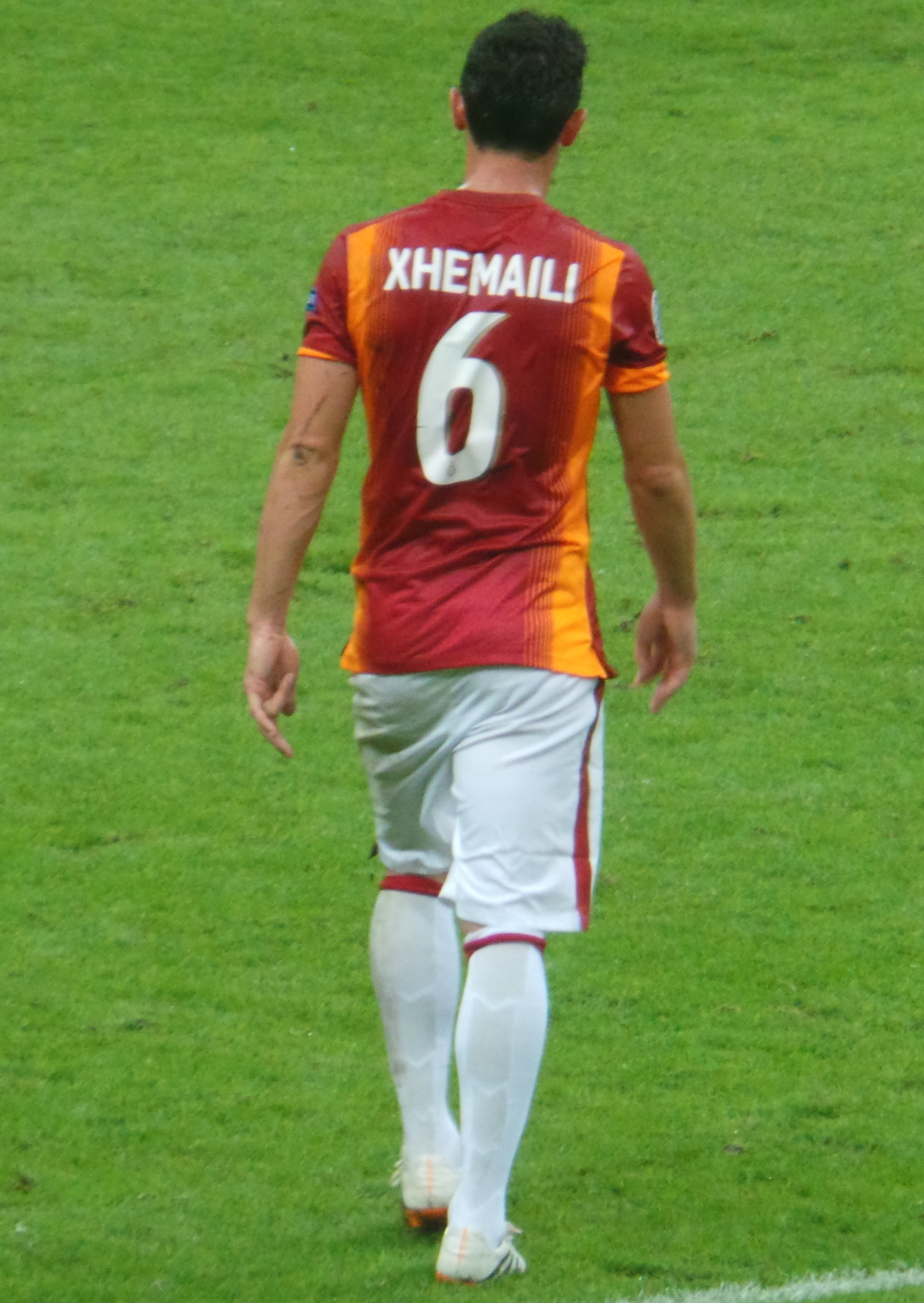 Blerim Dzemaili'nin Galatasaray'da giydiği formanın sırtında "Xhemaili" yazmaktadır.